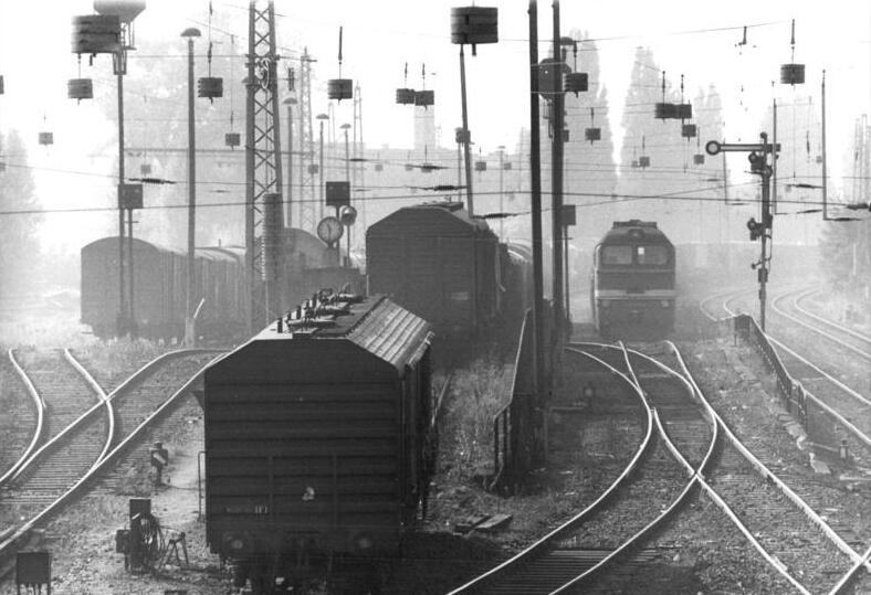 ADN-ZB-Uhlemann 24.10.85 Berlin: Rangierbahnhof Täglich rollen 1750 Güterwagen über den Ablaufberg des Rangierbahnhofes in Berlin-Pankow, die dann zu 50 Zügen mit einer maximalen Länge von 600 Metern zusammengestellt werden. Dabei unterbieten die Brigaden die 12,9 Stunden, die pro Wagen für Aufenthalt, Be- und Entladen vorgesehen sind, mit 11,1 Stunden. Die vornehmlich aus dem Norden kommenden Wagen verlassen die Hauptstadt dann wieder in Richtung Süden, unter anderem zu den Umschlagbahnhöfen Seddin, Halle und Senftenberg.